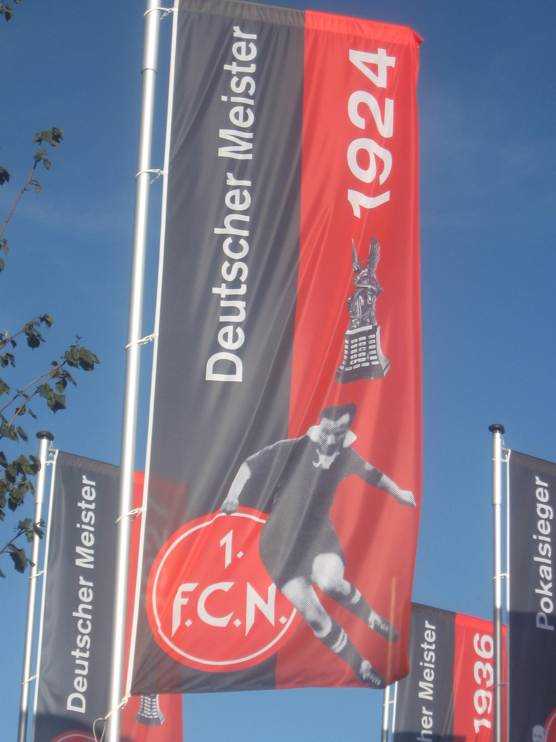 Fahne des 1. FC Nürnberg mit der Jahreszahl des Gewinnes der Deutschen Meisterschaft.